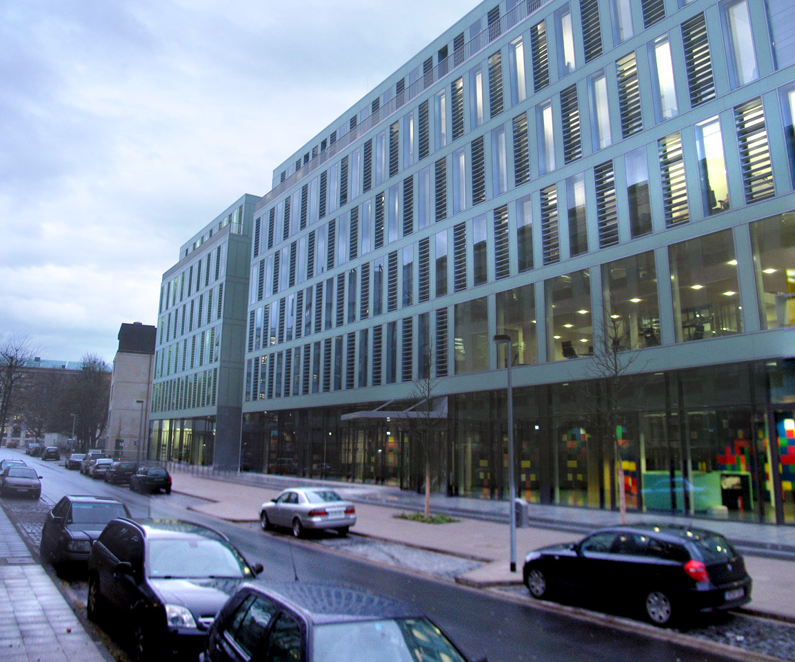 Blick von der Warmbüchenstraße in den Warmbüchenkamp